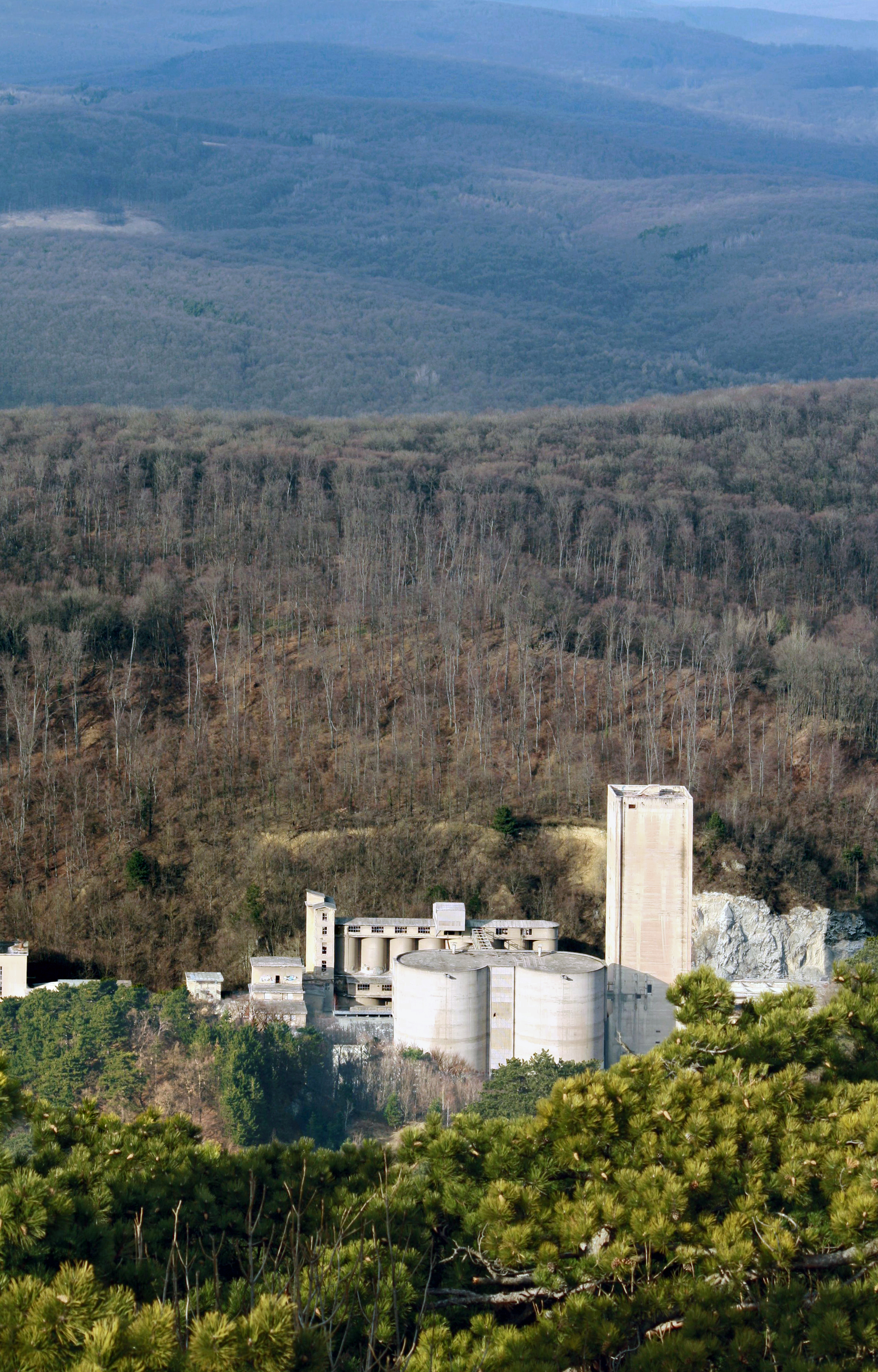 Blick auf das aufgelassene Perlmooser Zementwerk in Rodaun von der Josefswarte bei Perchtoldsdorf